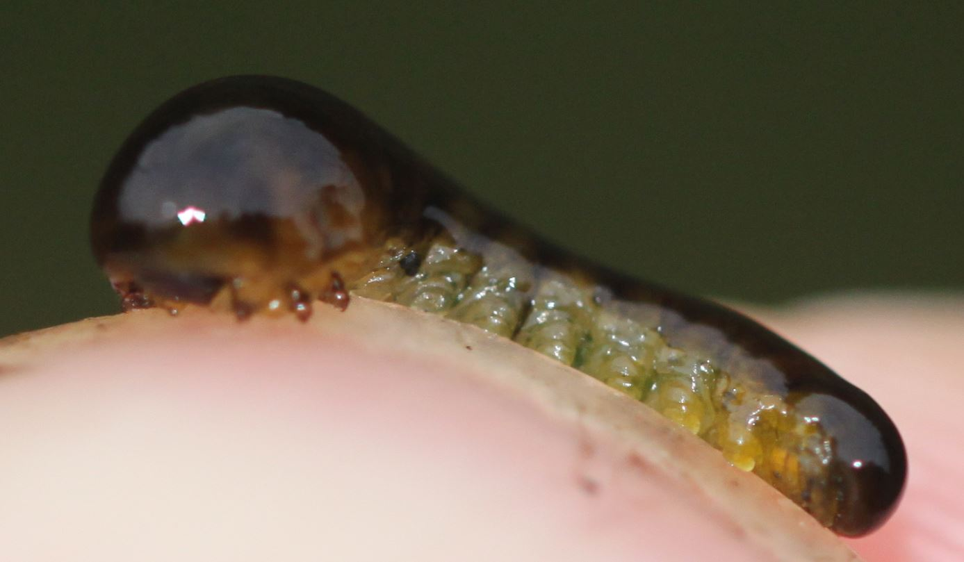 Larve der Kirschblattwespe (Caliroa cerasi) am 7.10.2016 in der Schwetzinger Hardt